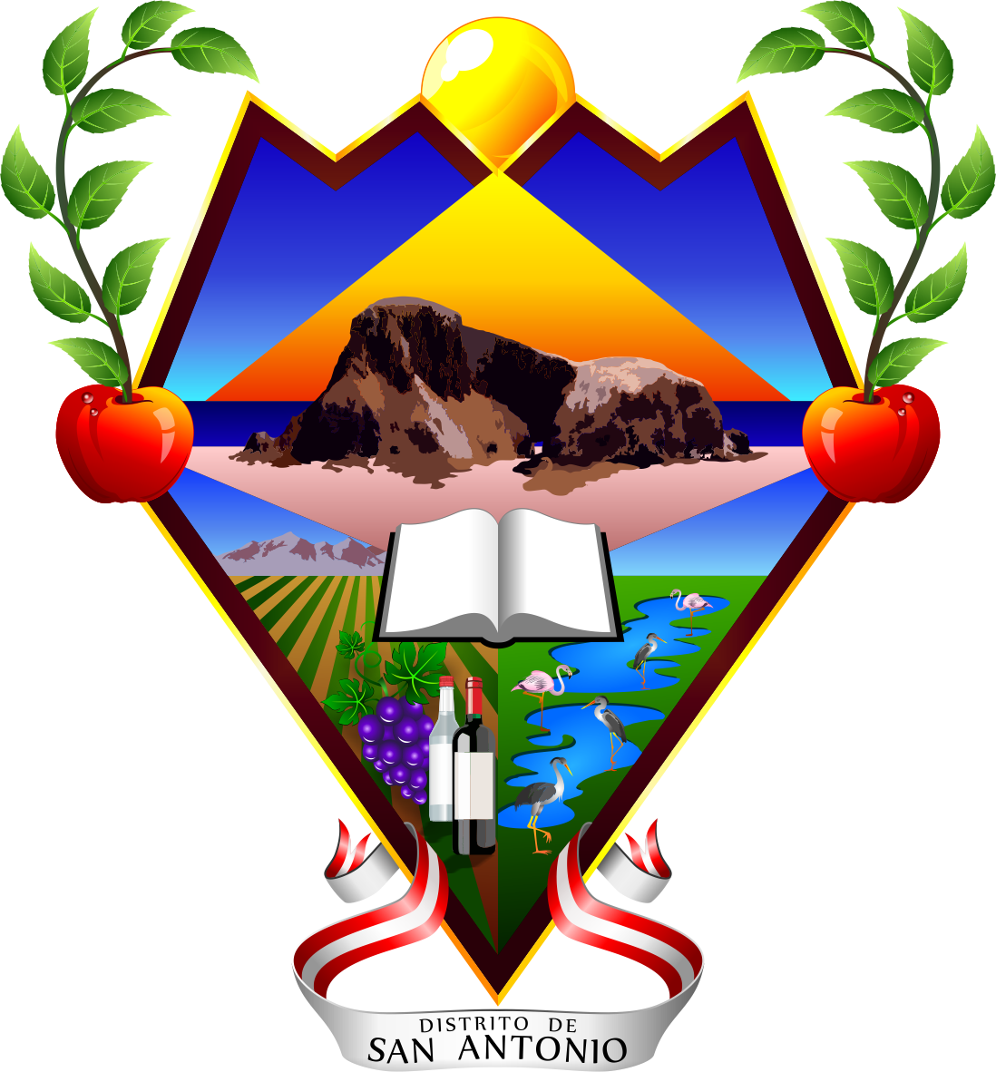 Distrito de San Antonio - Provincia de Cañete - Región Lima